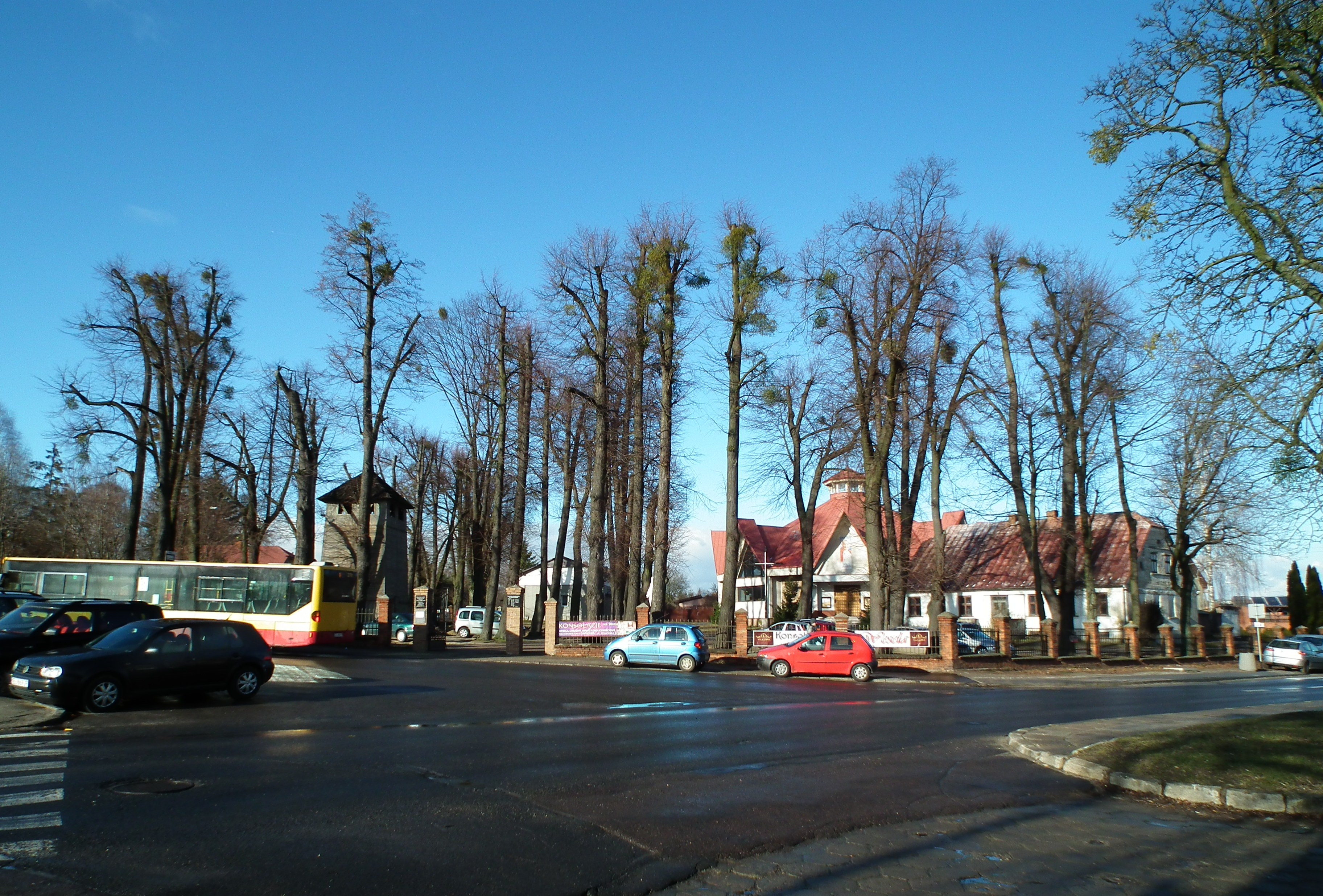 Centrum Nowosolnej w Łodzi.